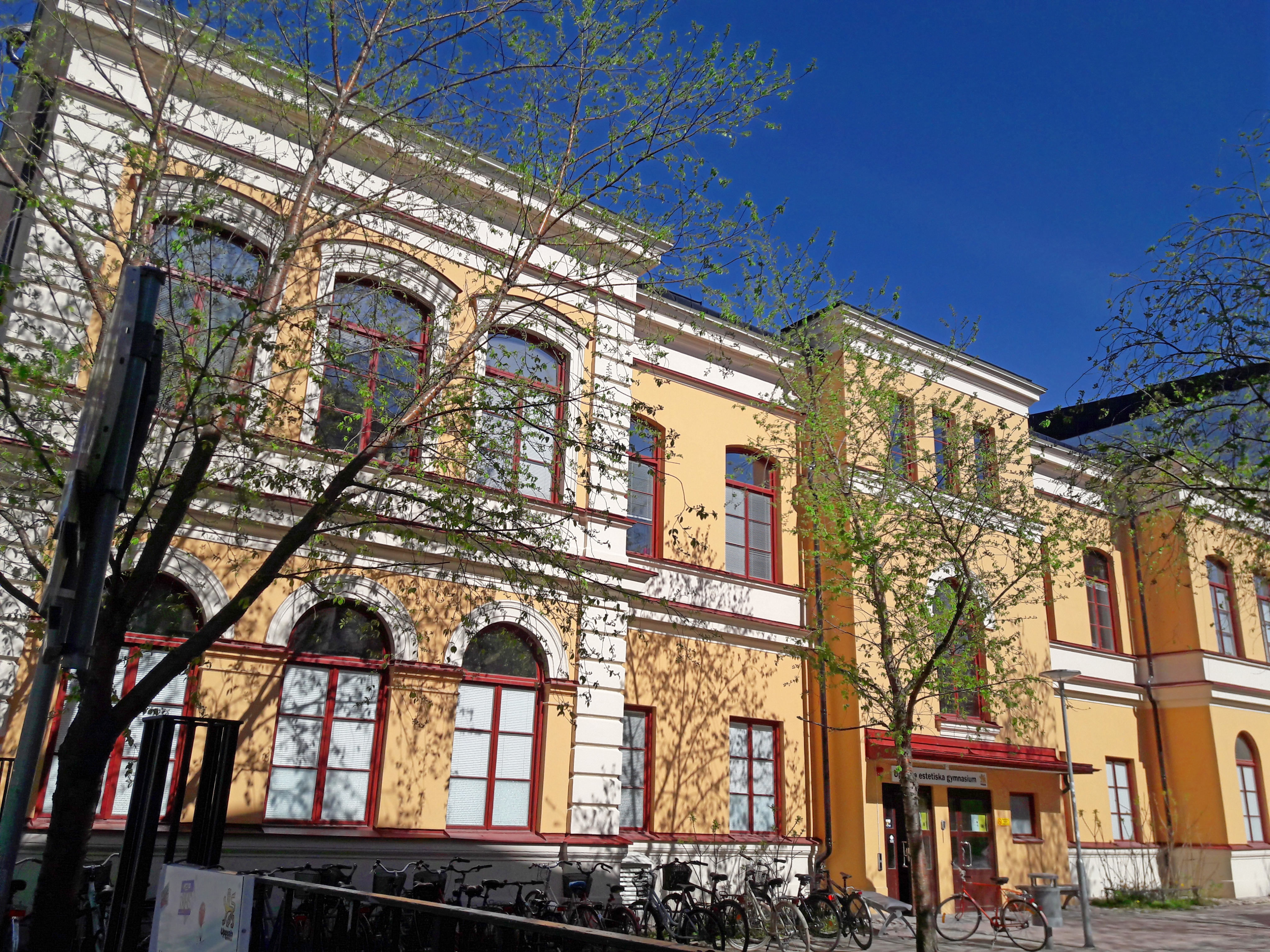 Uppsala Estetiska Gymnasium maj 2018.